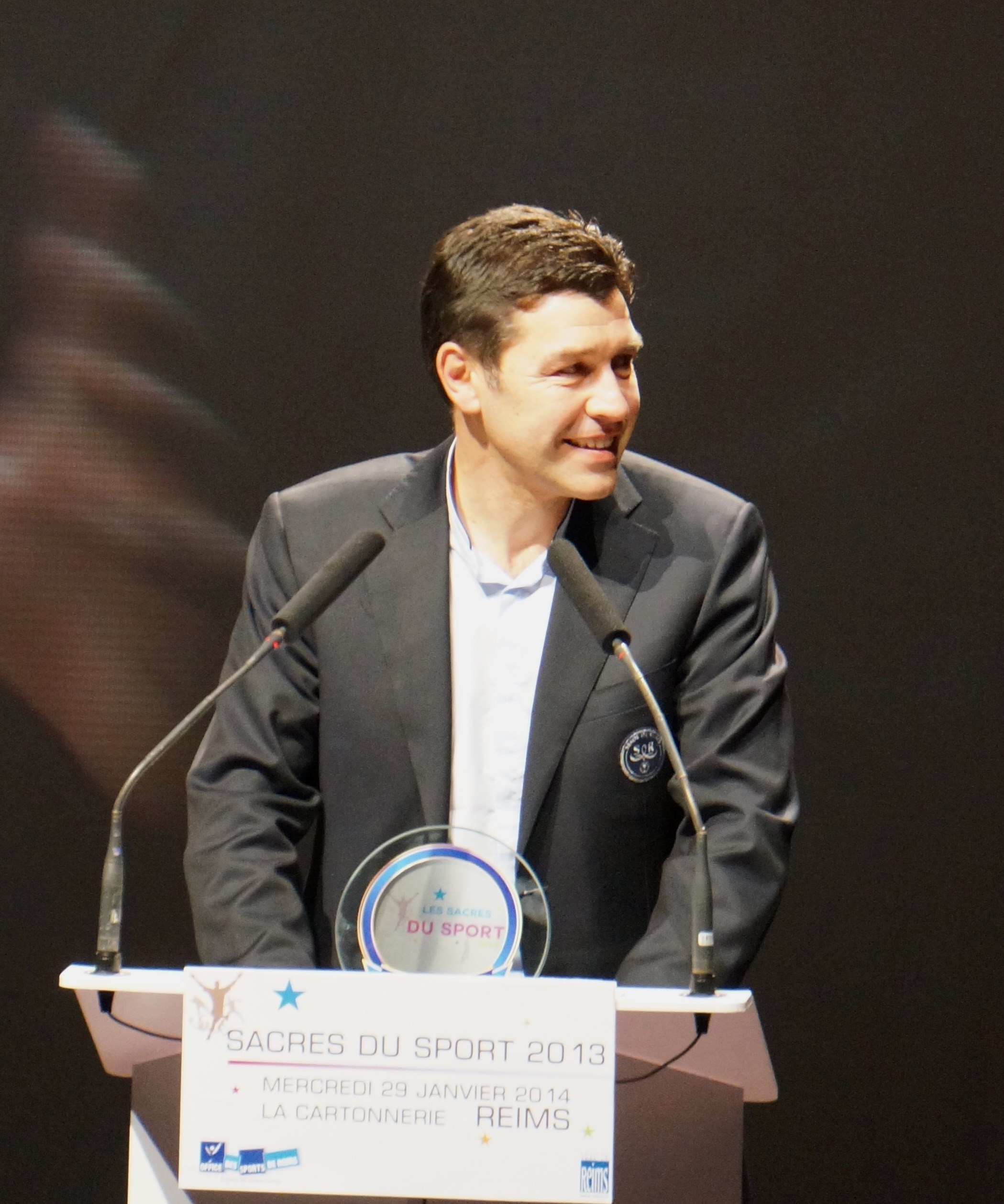 Lors des Sacres du sport 2013 (Reims).